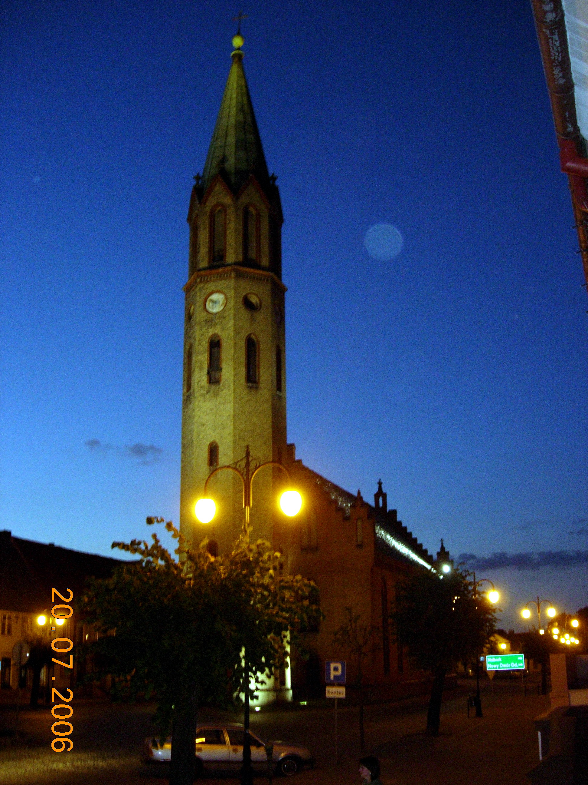 Zbór ewangelickie w Nowym Stawie z roku 1800